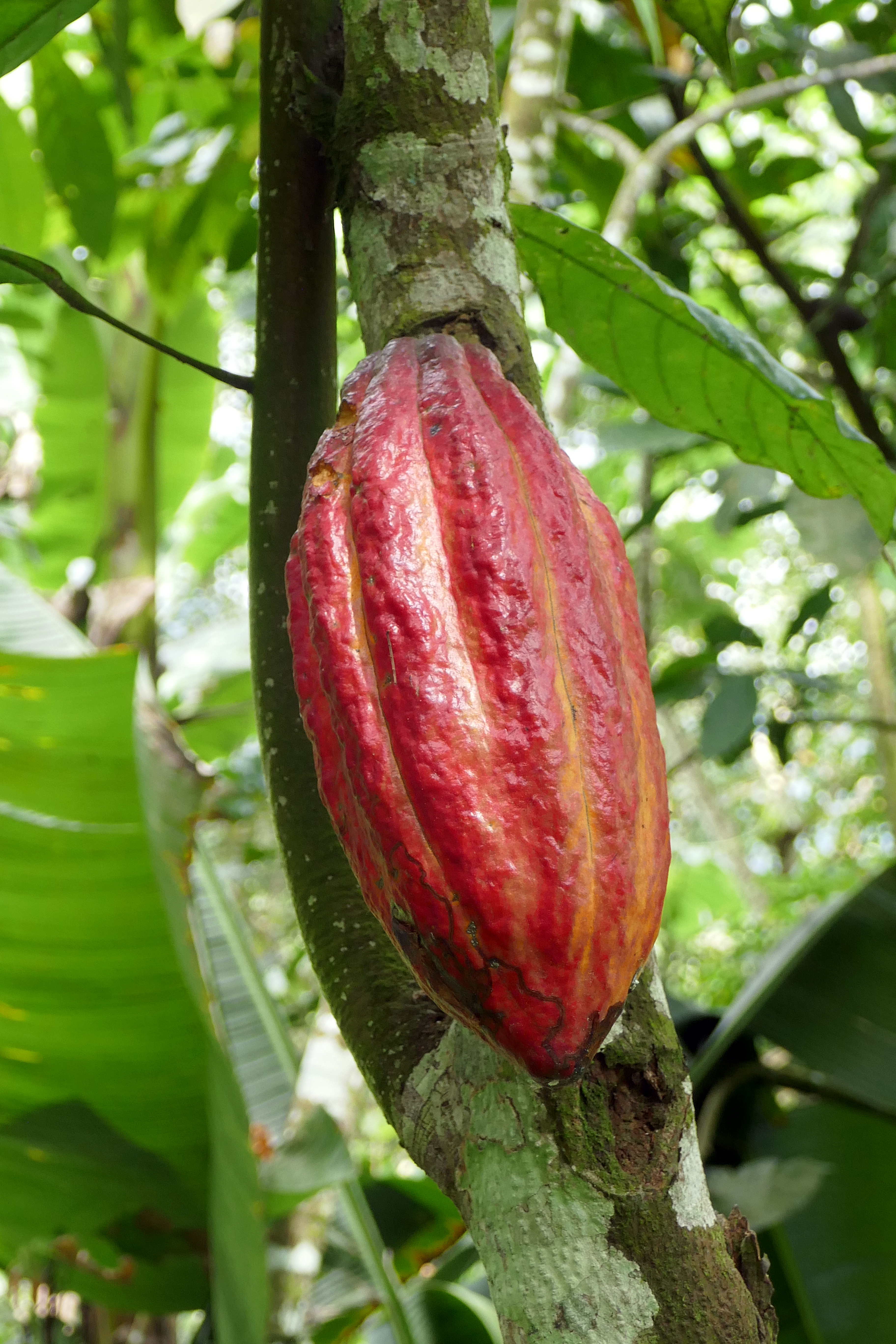 Cabosse de cacao dans une plantation à l'est de l'île de São Tomé (São Tomé-et-Principe).